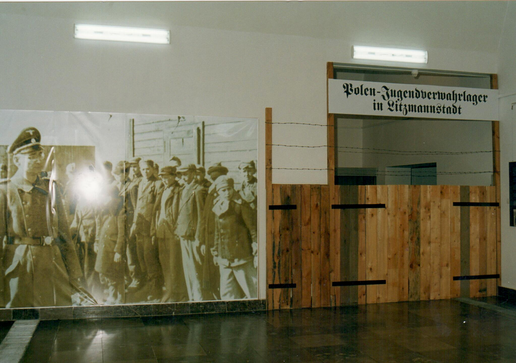 (OL), Powrót do przeszłości. [Wystawa czasowa p.t. „Tylko gorycz i tęsknota. Losy polskich dzieci w obozie przy ul. Przemysłowej w Łodzi“]; [w:] „Gazeta Wyborcza–Łódź”, 8 VII 2001, nr ...., s. 5. [„W obozie panował surowy rygor, za drobne przewinienie karano chłostą –wspomina była więźniarka. W grudniu 1942 r., na terenie łódzkiego getta, w obrębie obecnych ulic Brackiej – E. Plater – Górniczej i Spornej, wyodrębniono obóz dla polskich dzieci i młodzieży. Historię obozu opowiada wystawa „Tylko gorycz i tęsknota....” (otwarcie 1 czerwca 2001) Losy dzieci polskich w obozie przy ul. Przemysłowej w Łodzi”, którą pokazuje filia Muzeum Tradycji Niepodległościowych na Radogoszczu w Łodzi. (...).”]